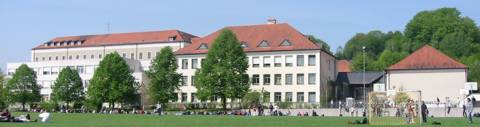 Gymnasium Gars